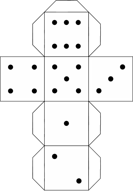 Uitslag van een dobbelsteen.